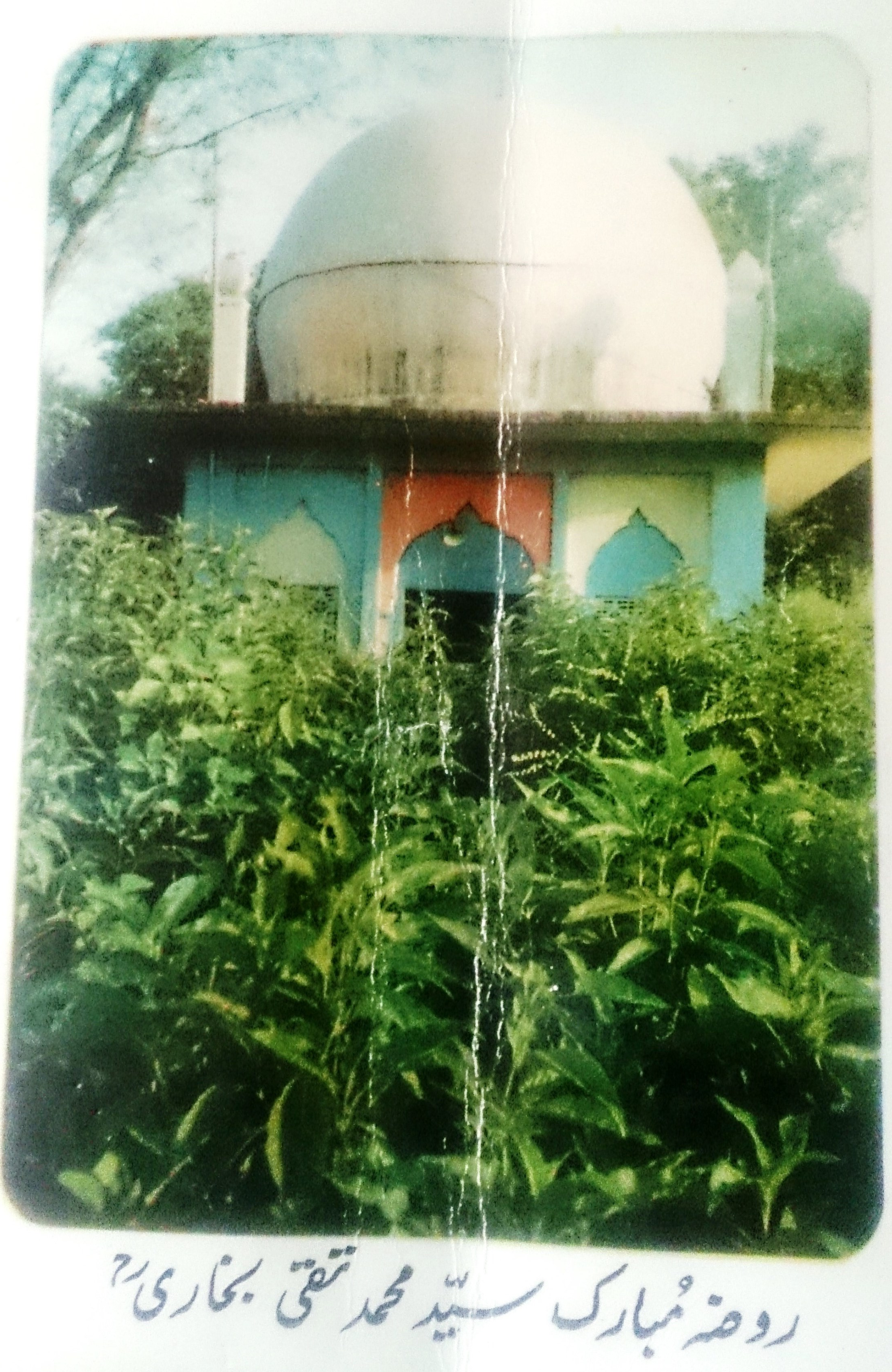 خیر الاتقیاء ولیٰ کامل سید محمد تقی بخاری دھولی